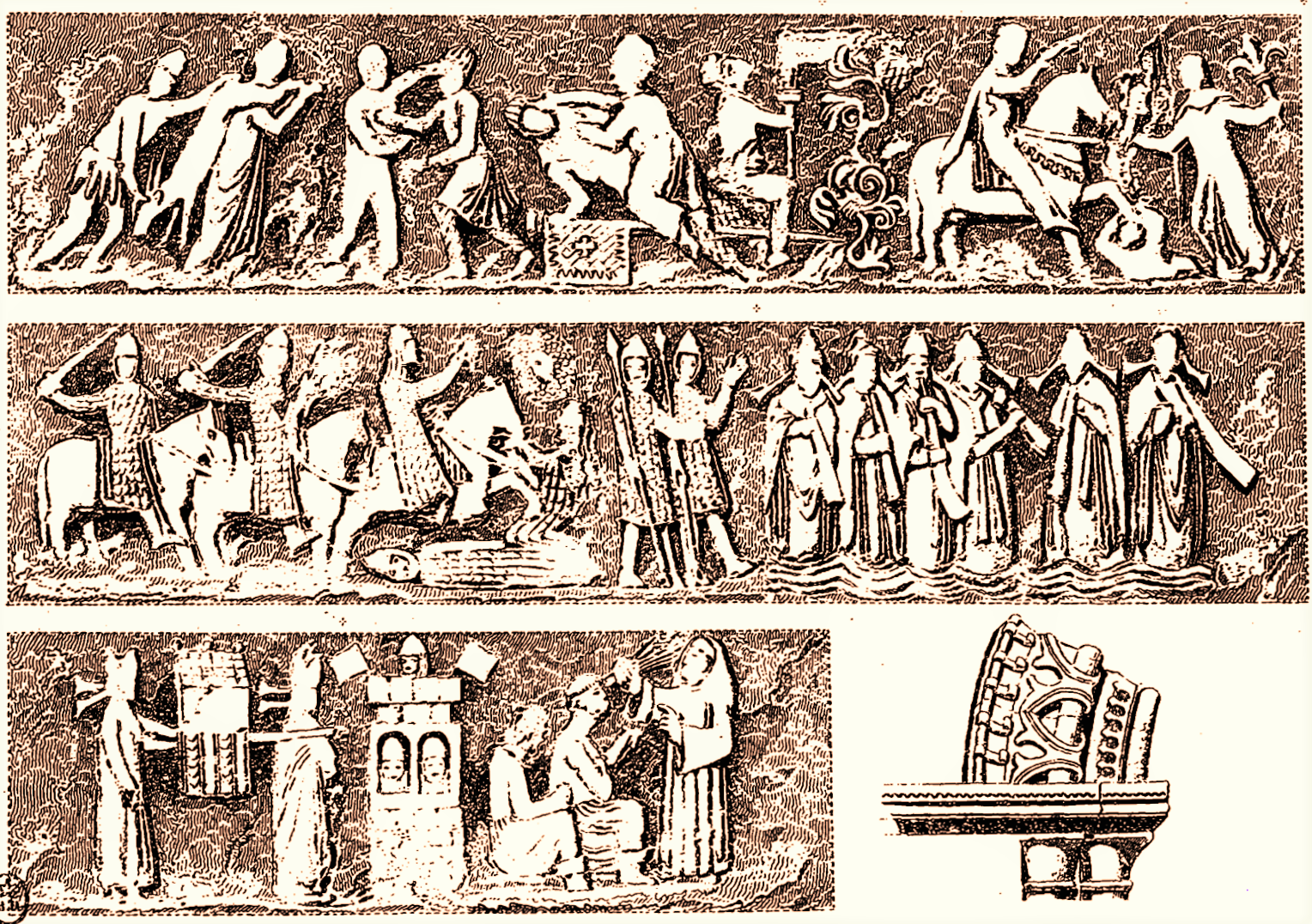 Abbaye Saint-Georges de Boscherville: Dessins publiés par Cotman en 1822 (Image du domaine public modifiée)